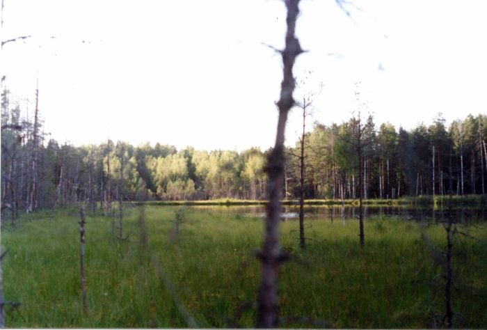 Väike-Virna järv kagust